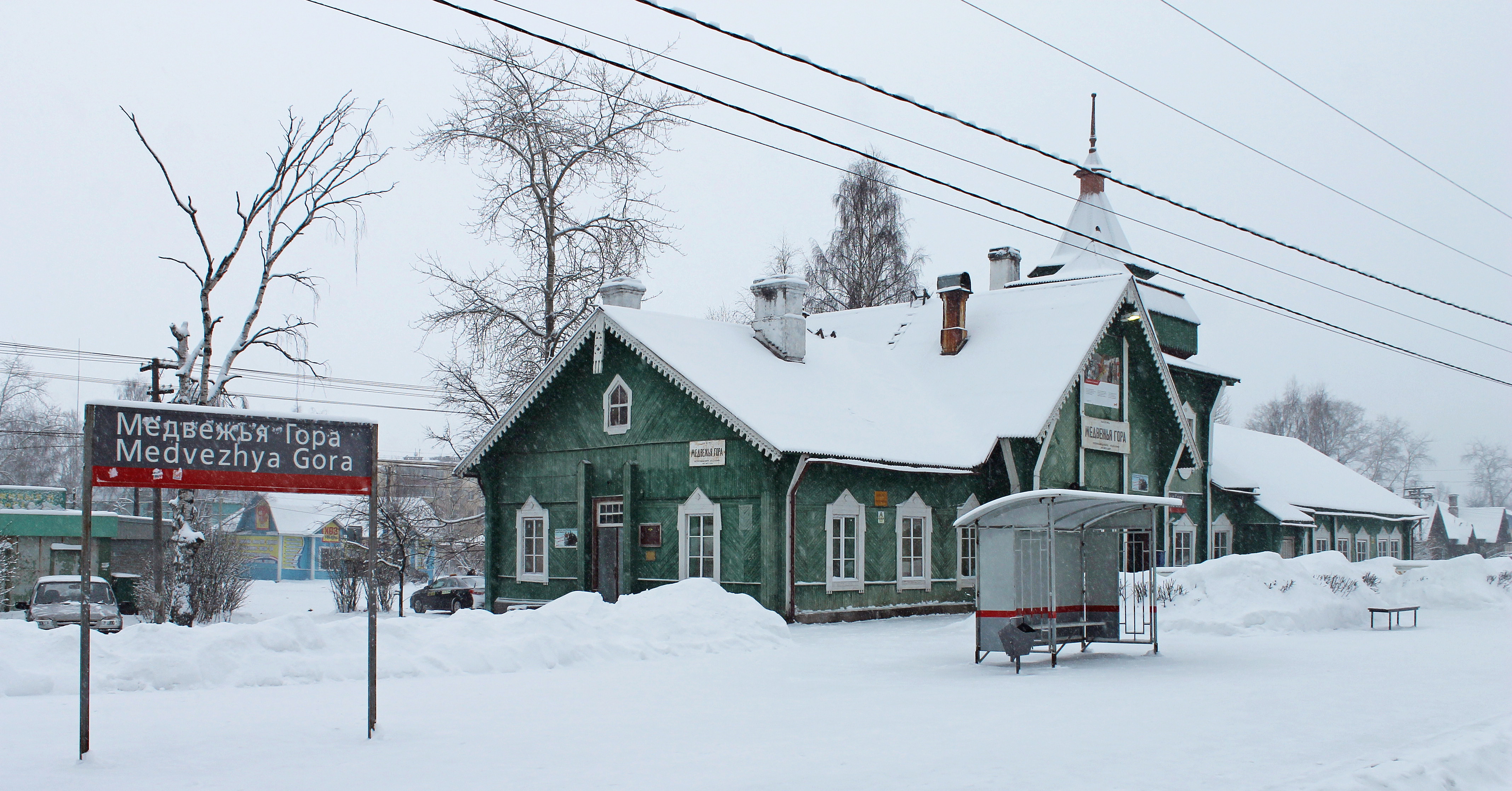 Вокзал станции Медвежья Гора.